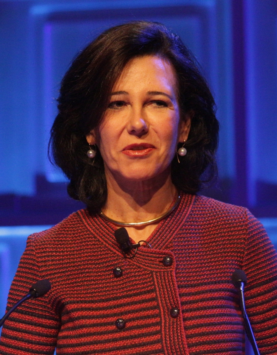 WTTC Global Summit 2015